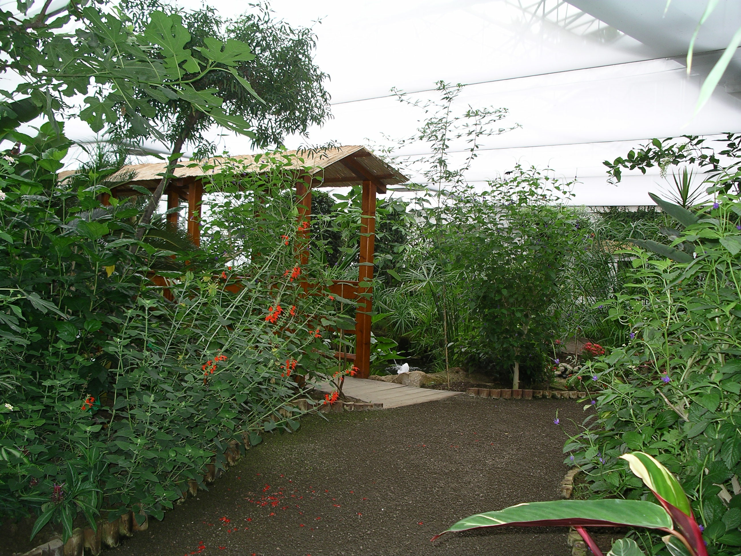 Schmetterlingsgarten in Grevenmacher (Jardin des papillons)